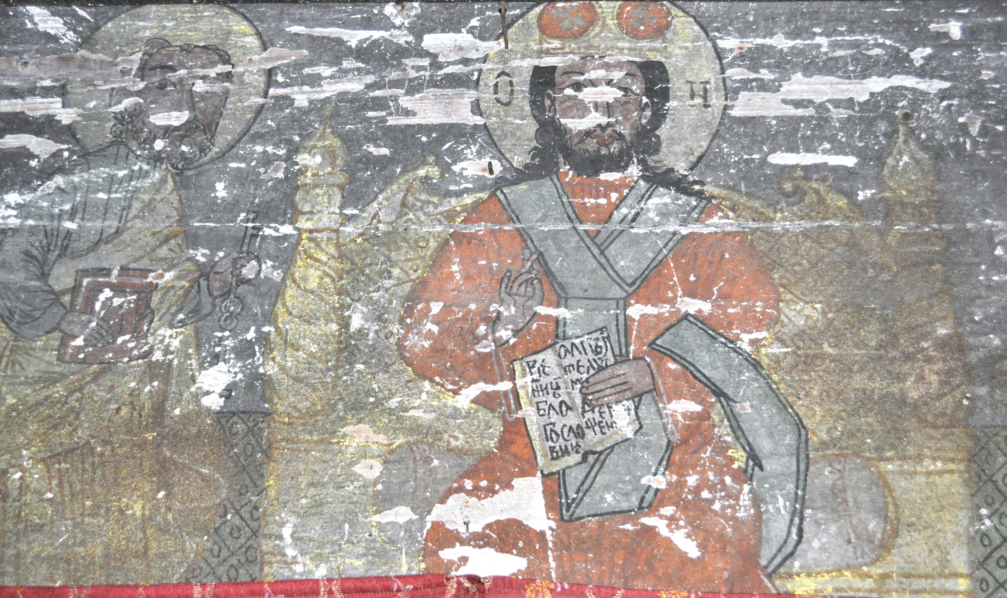 Biserica de lemn din Stolna, județul Cluj